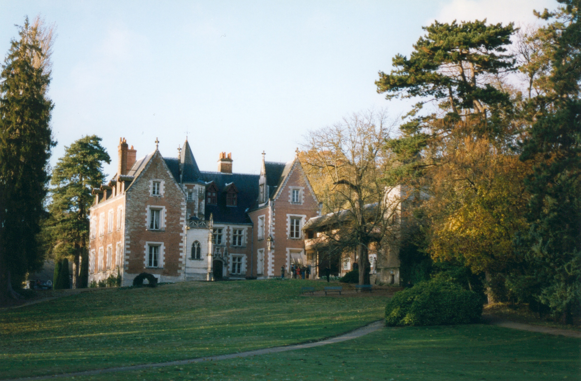 Le Clos Lucé, en Indre-et-Loire, en France